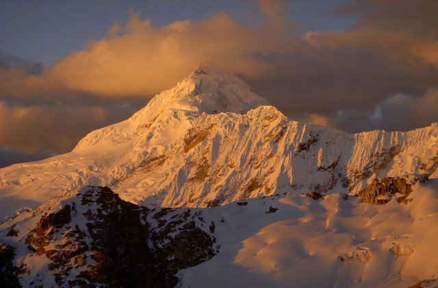 Tocllaraju